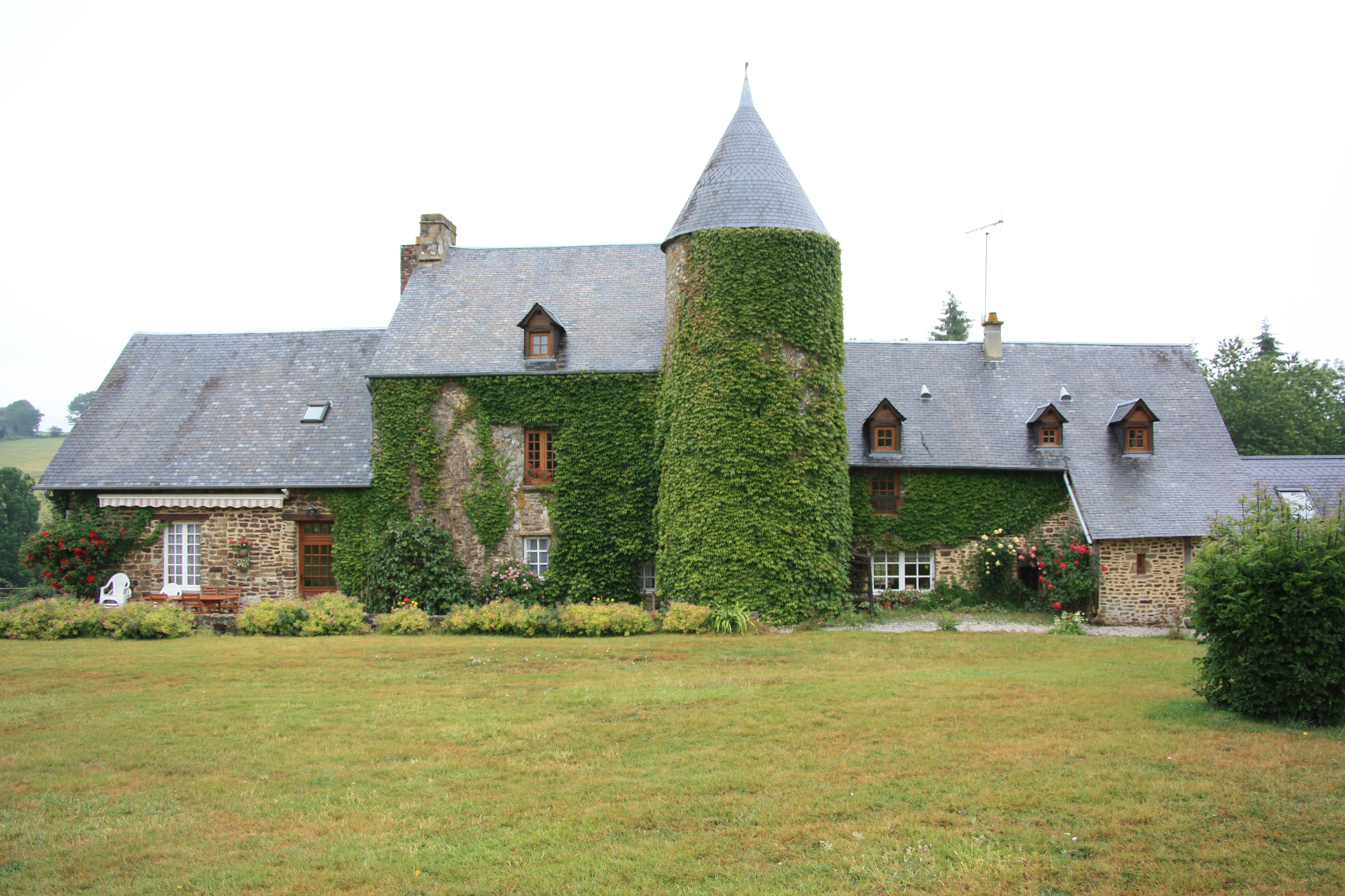 Manoir de la Nocherie (XVe siècle)